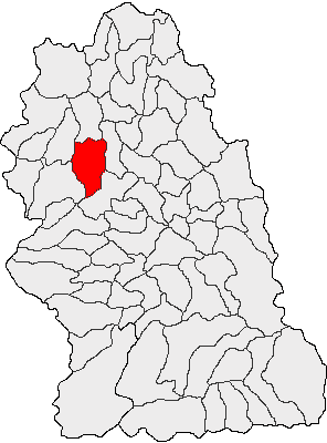 Categorie:Hărţi ale judeţului Hunedoara